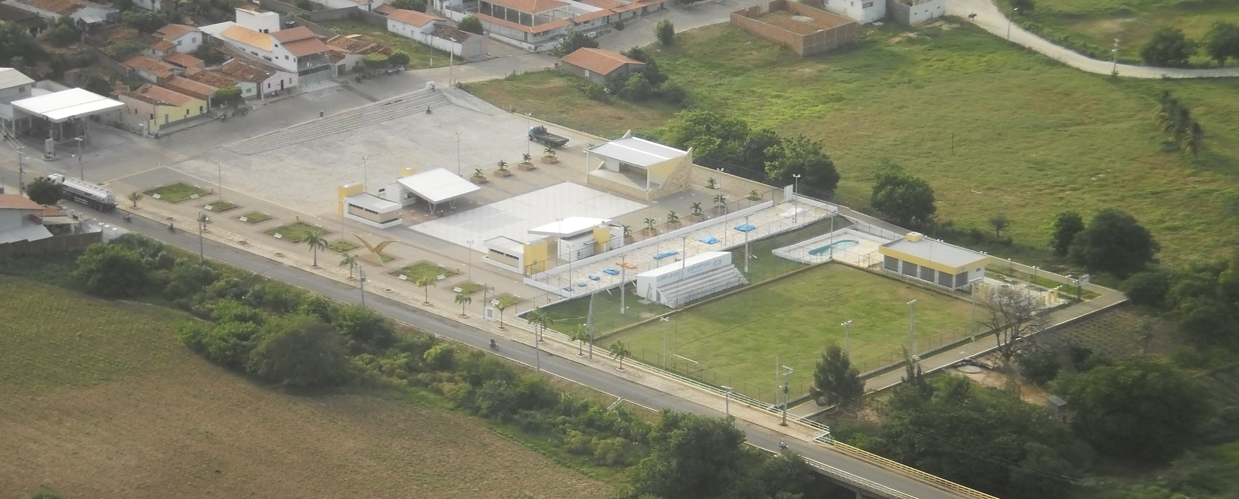 Complexo de Lazer "Valdir Félix da Silva", onde estão situados a Praça de Eventos, o Complexo Esportivo Valdir Félix e o parque infantil, vistos do mirante do Santuário de São João Batista. Encanto, Rio Grande do Norte, Brasil.